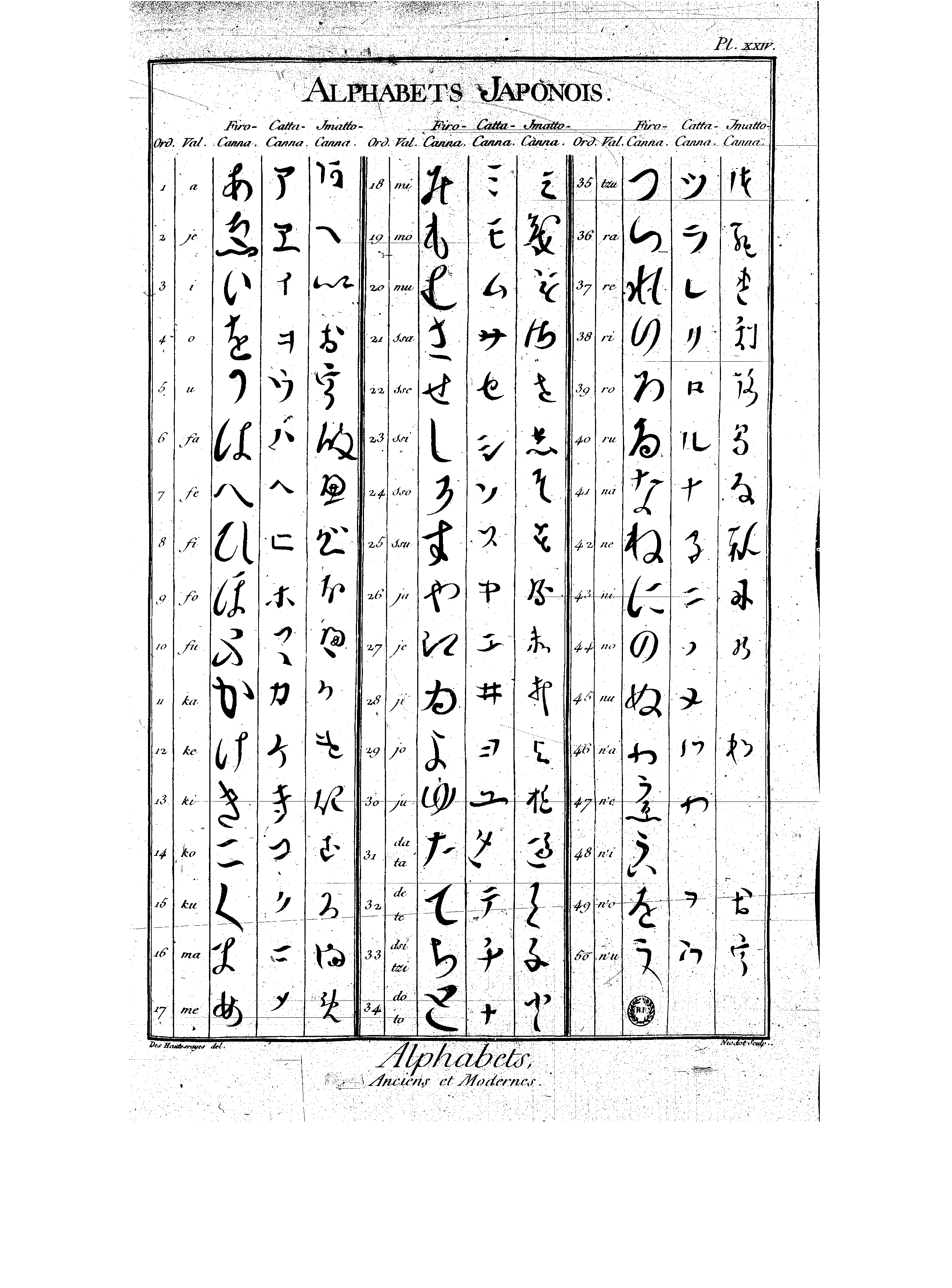 Planches de l'Encyclopédie de Diderot et d'Alembert, volume 2